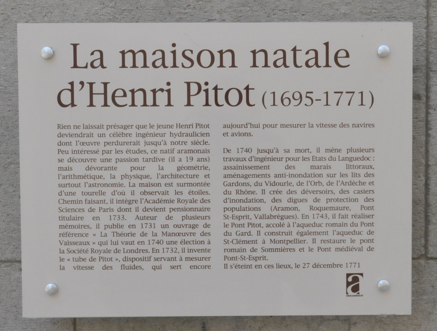 Informationstafel am Geburtshaus von Henri Pitot in Aramon